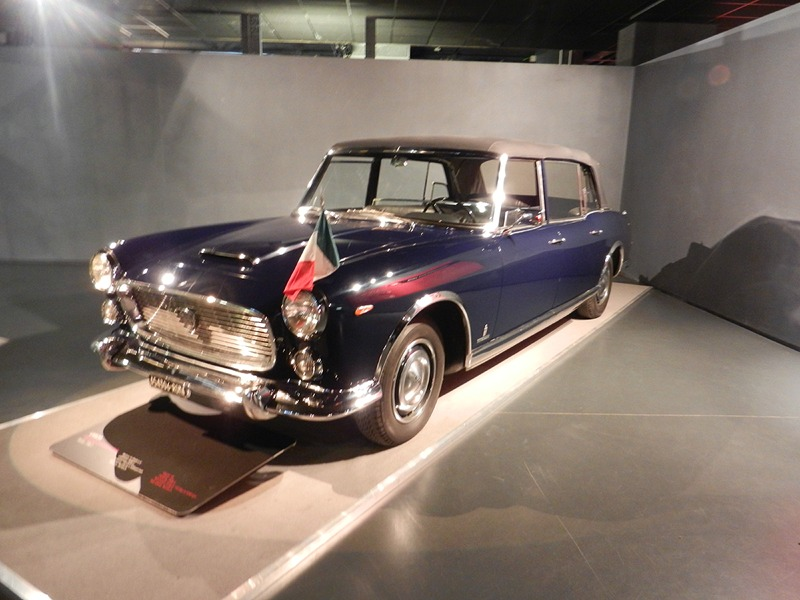 Torino - Lancia Flaminia 335 presidenziale del 1961 in mostra al Museo dell'Automobile